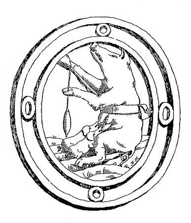 La Truie qui file, motif décoratif utilisé ici à Paris pour un balcon 87bis rue Saint-Antoine au XVIIIème siècle.